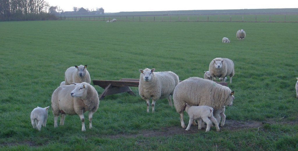 Texelschafe